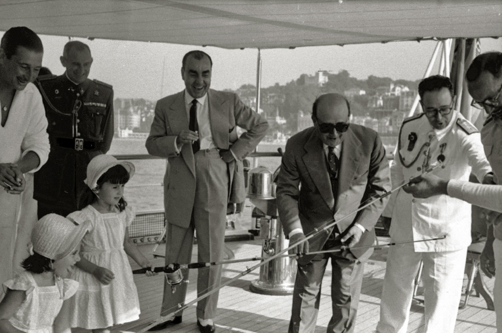 Título original: Franco y sus nietos en el Azor (2/4) Localización: Guipúzcoa